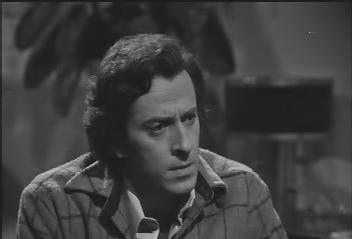 Mariano Rigillo nello sceneggiato Dov'è Anna?